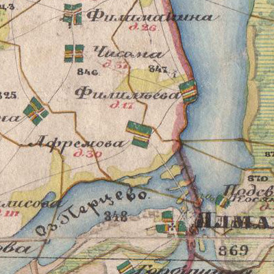 Деревня Ефремово на карте 1850 года